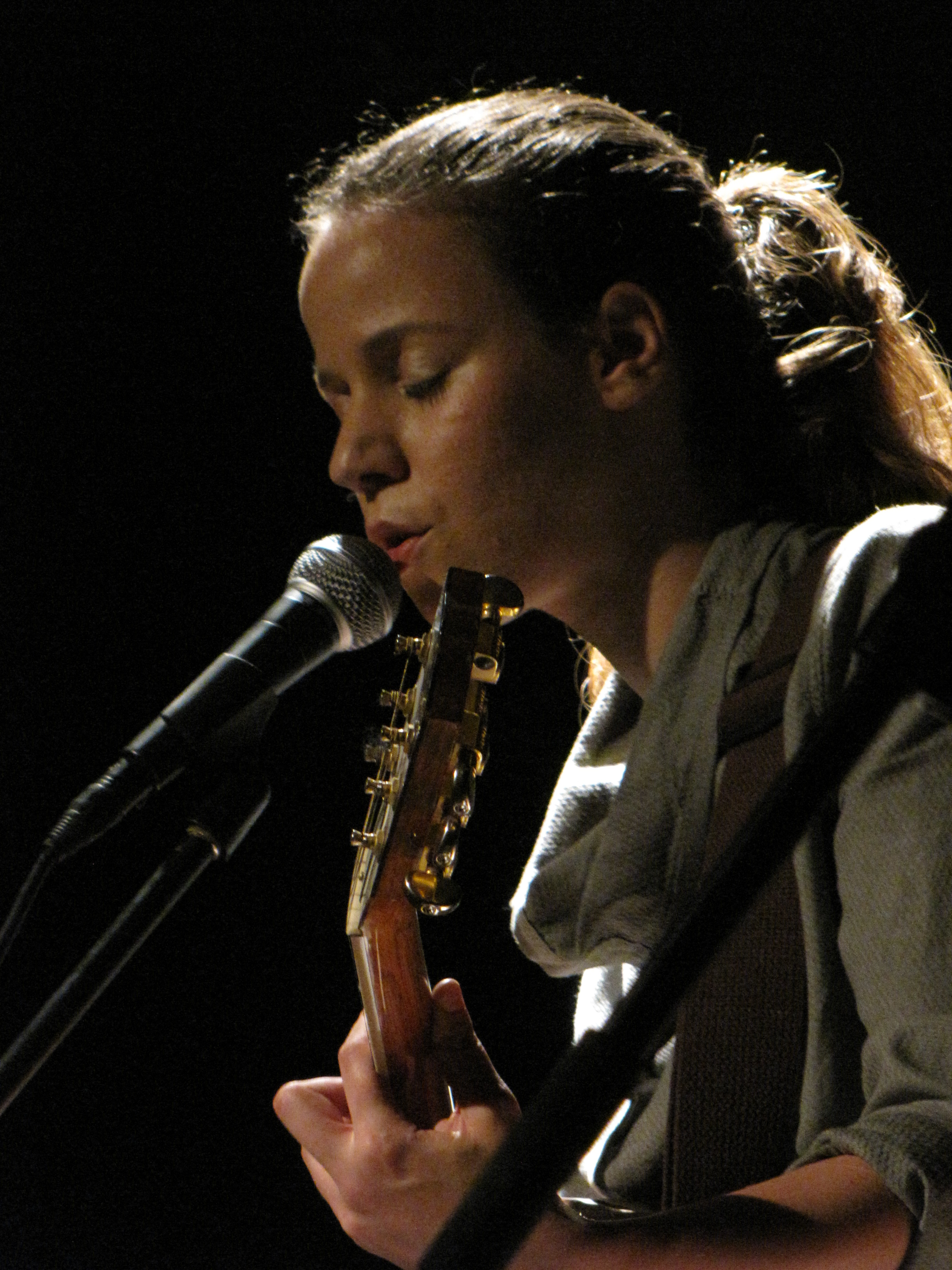 רונה קינן בצוללת הצהובה